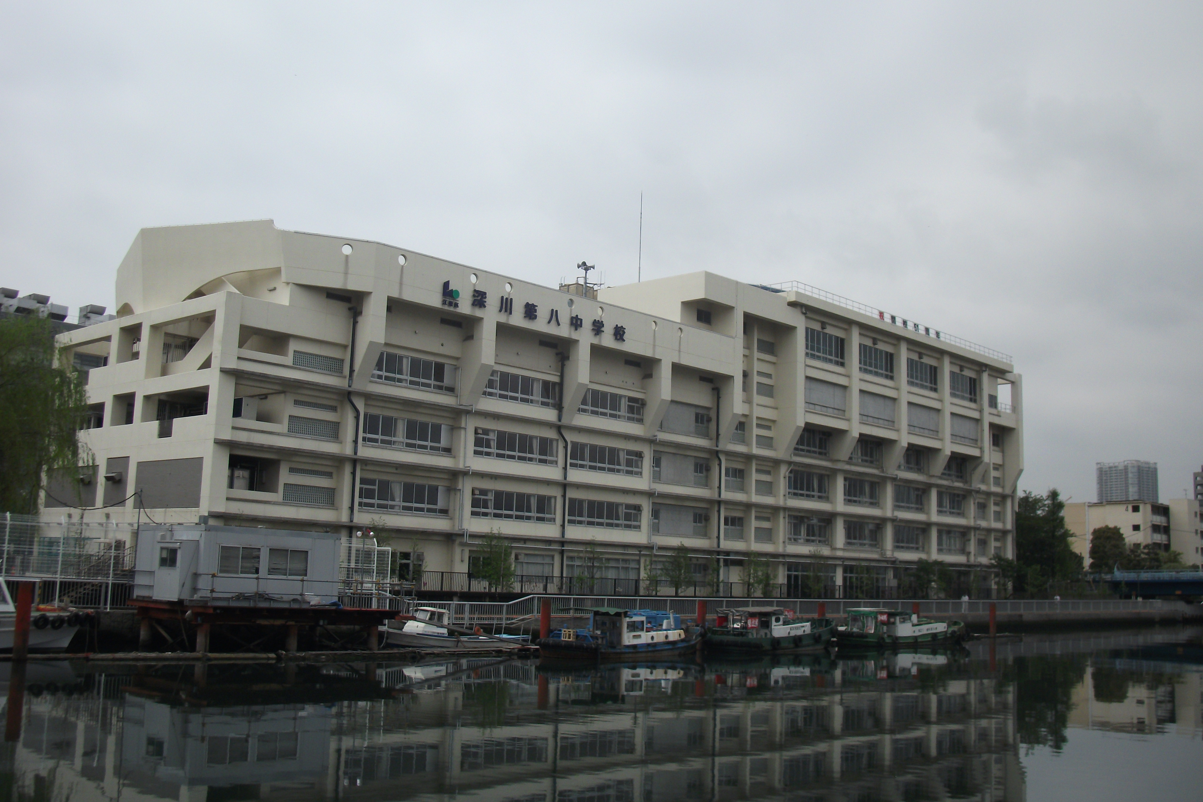 江東区立深川第八中学校